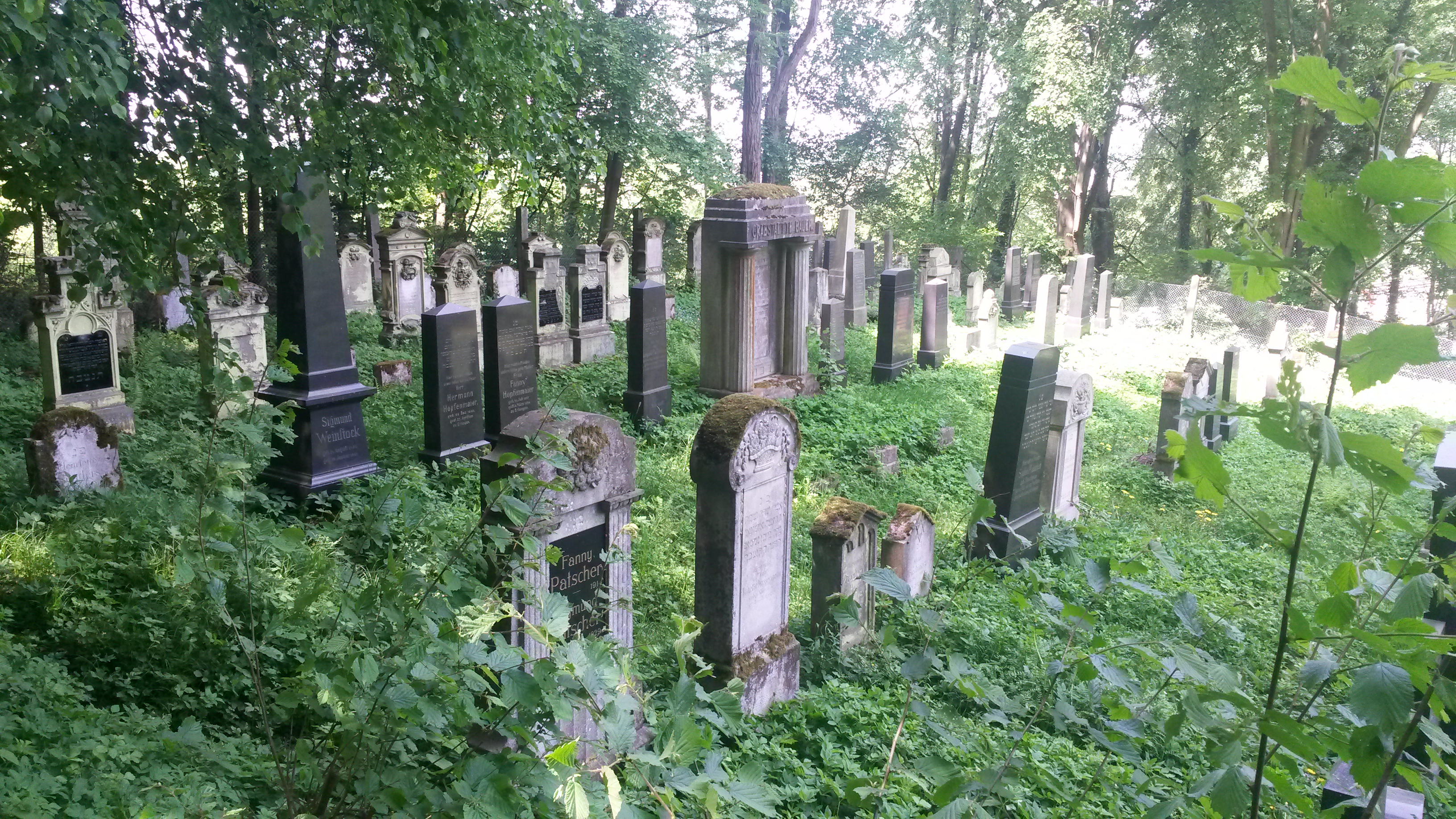 Jüdischer Friedhof in Erlangen, Blick vom südlichen Zaun